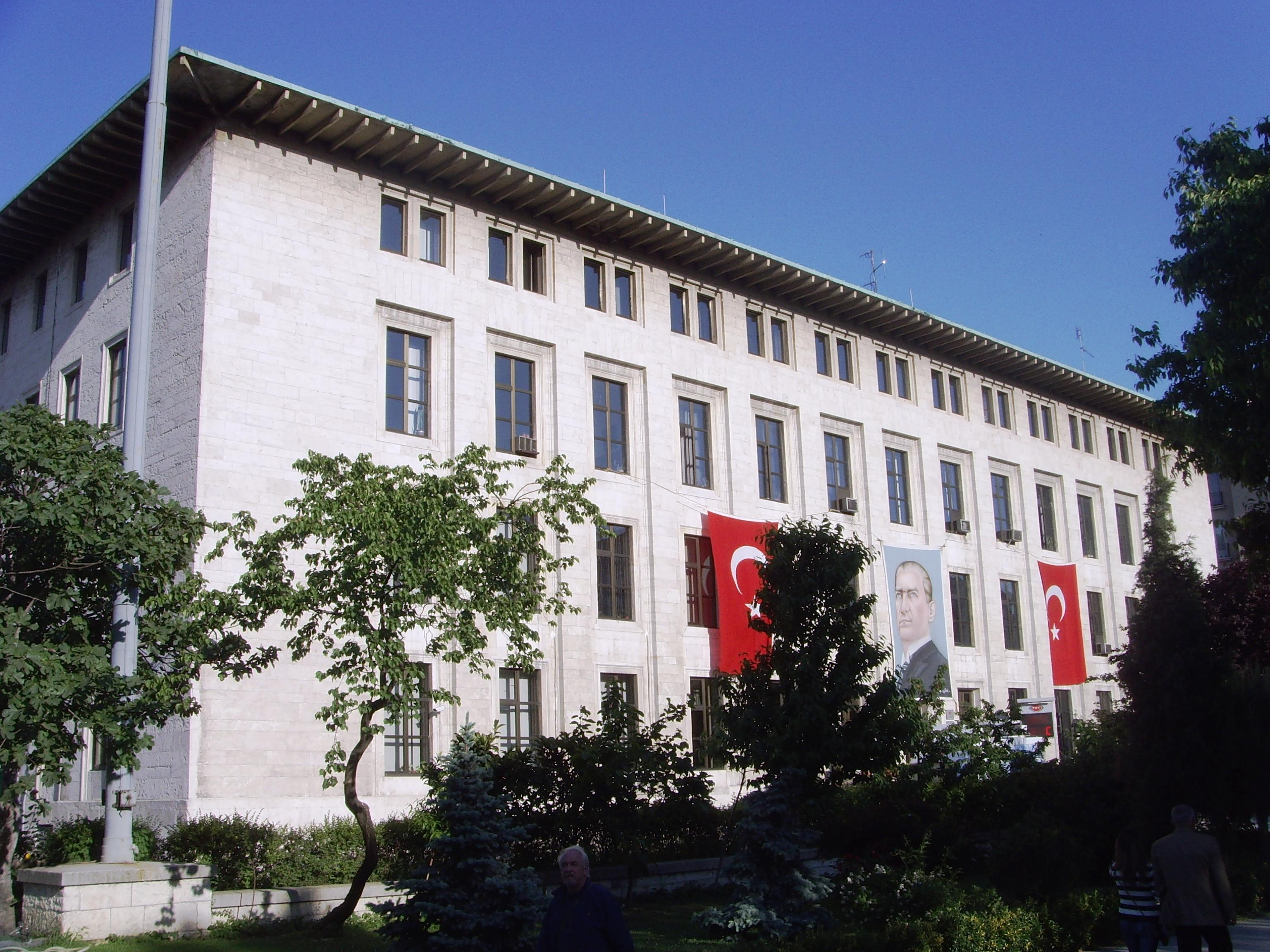 TRT İstanbul Radyosu'nun yer aldığı İstanbul Radyoevi / İstanbul Radiohause - TRT İstanbul Radio